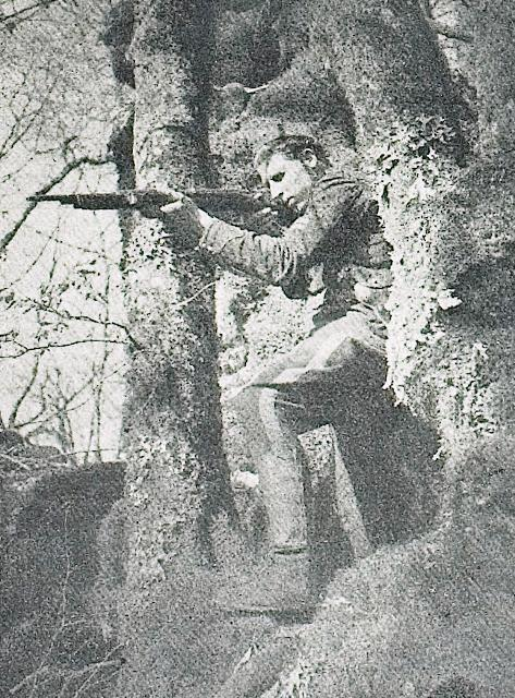 Partizanski ostrostrelec.